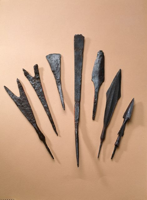 Suomessa rautakaudella vuosien 800-1050 välillä käytössä olleita nuolenkärkiä